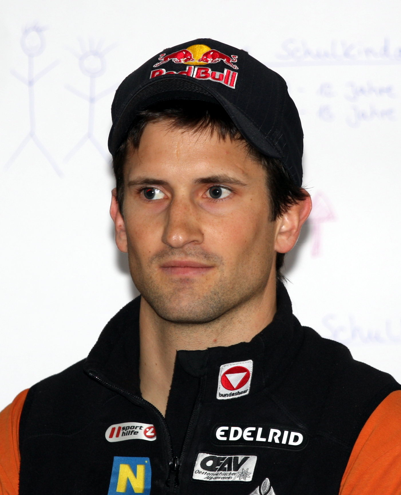 Kilian Fischhuber bei der Veranstaltung Challenge The Wall im Kletterzentrum Gilching